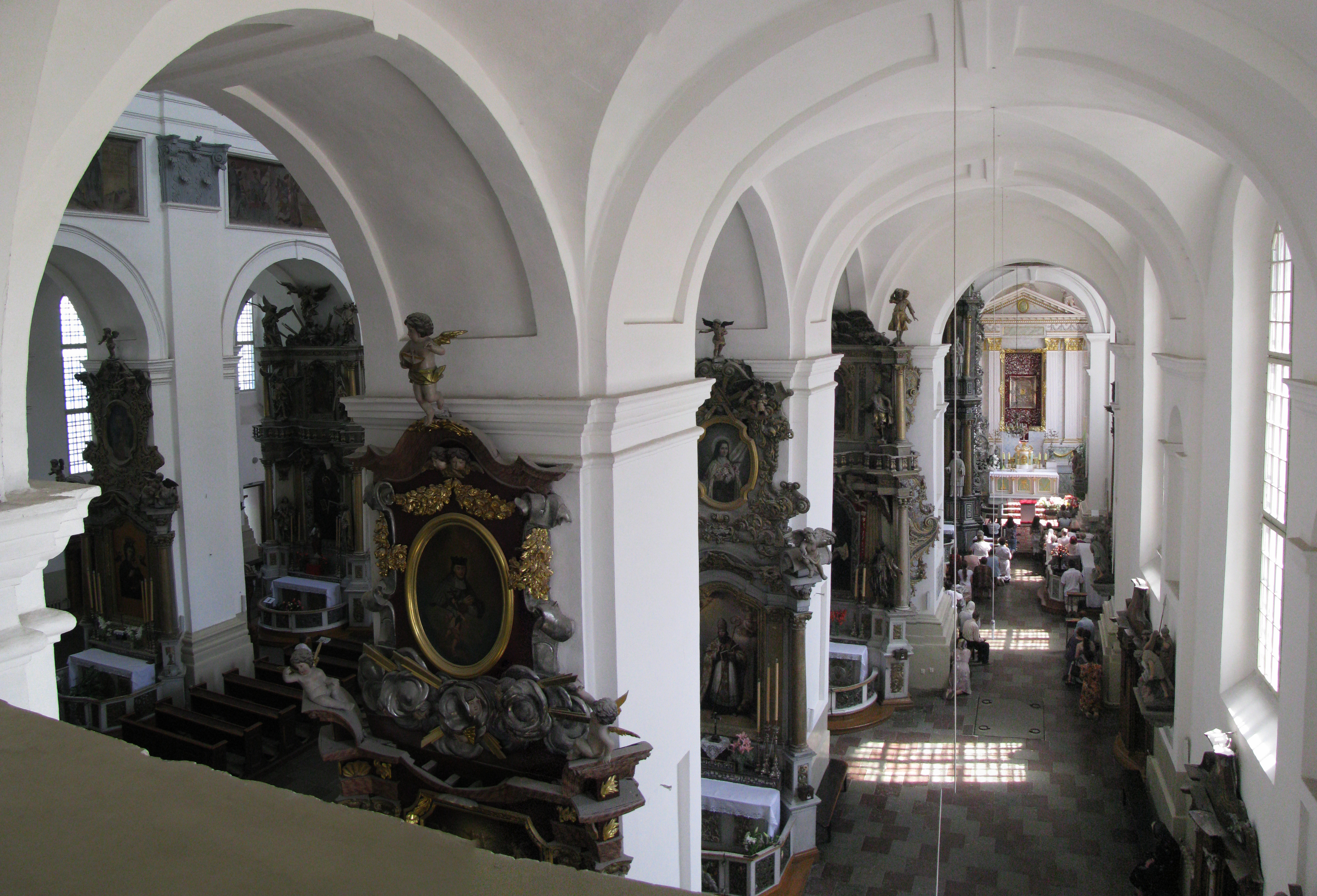 Беларуская (тарашкевіца): Ансамбль былога кляштара езуітаў:касьцёлдэкаратыўнае аздабленьне інтэр’ера касьцёла: галоўны алтар, 12 алтароў, амбон, 16 фрэскавых кампазіцый, фрэскі на парусах, росьпісы на падпружных арках, помнік на магіле А. Тызэнгаўза, арган, лаваў прэсбітэрыі, расьпісаная на тэмы жыційных сюжэтаў, два таршэры ў прэсбітэрыі, дзьве спавядальніжылыя карпусыаптэкаагароджа. г. Горадня This is a photo of Belarusian heritage monument. Reference number: 412Г000028 ( WLM)